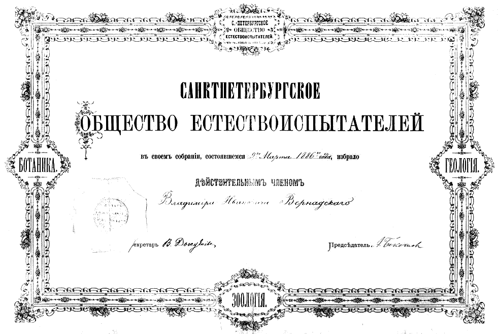 В. И. Вернадский. Санкт-Петербургское общество естествоиспытателей